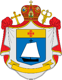 Massimo V Hakim - Wappen